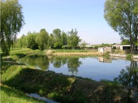 Etang de Chéry les Pouilly (2006)